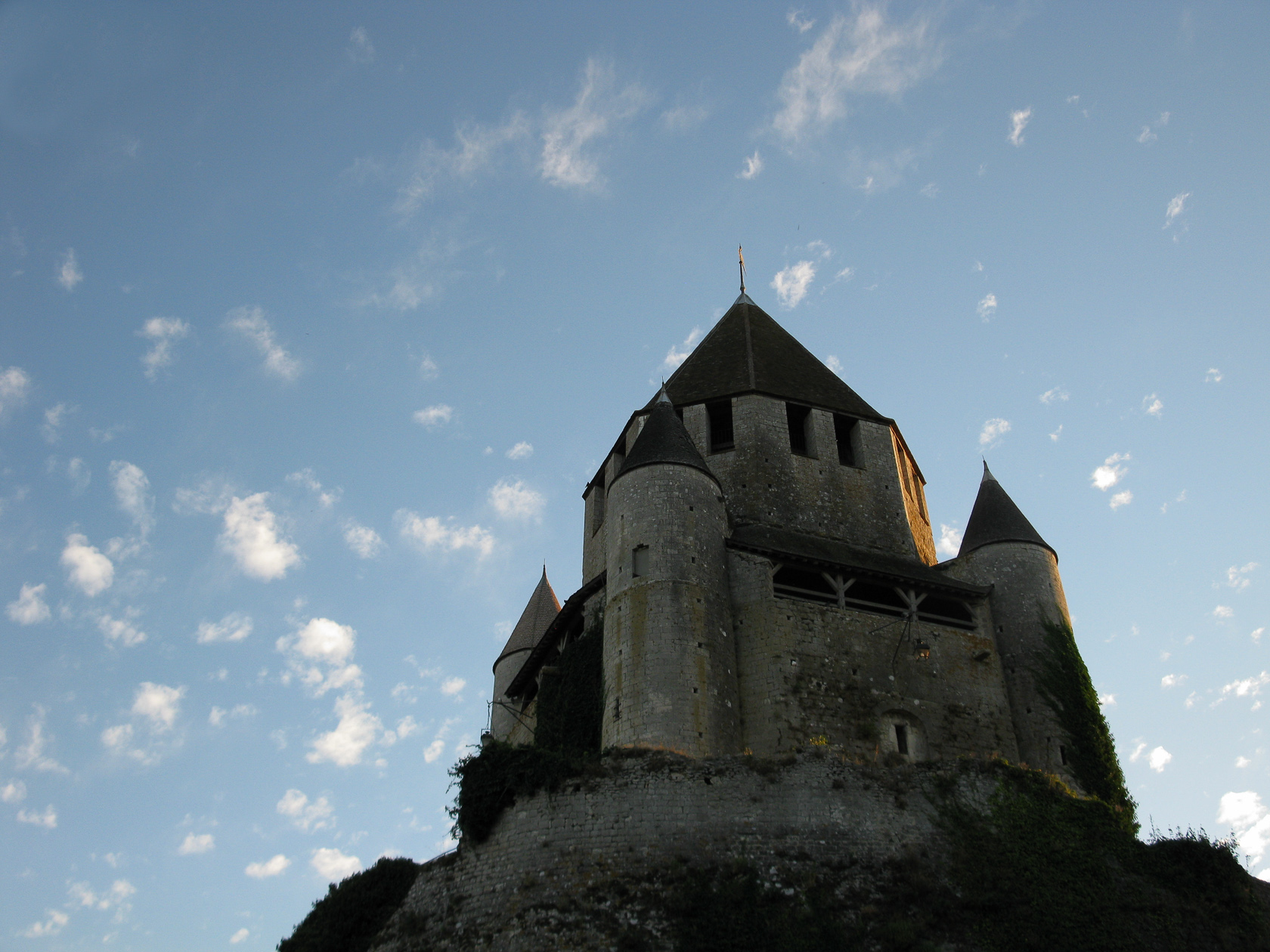 Tour César (Classé) .